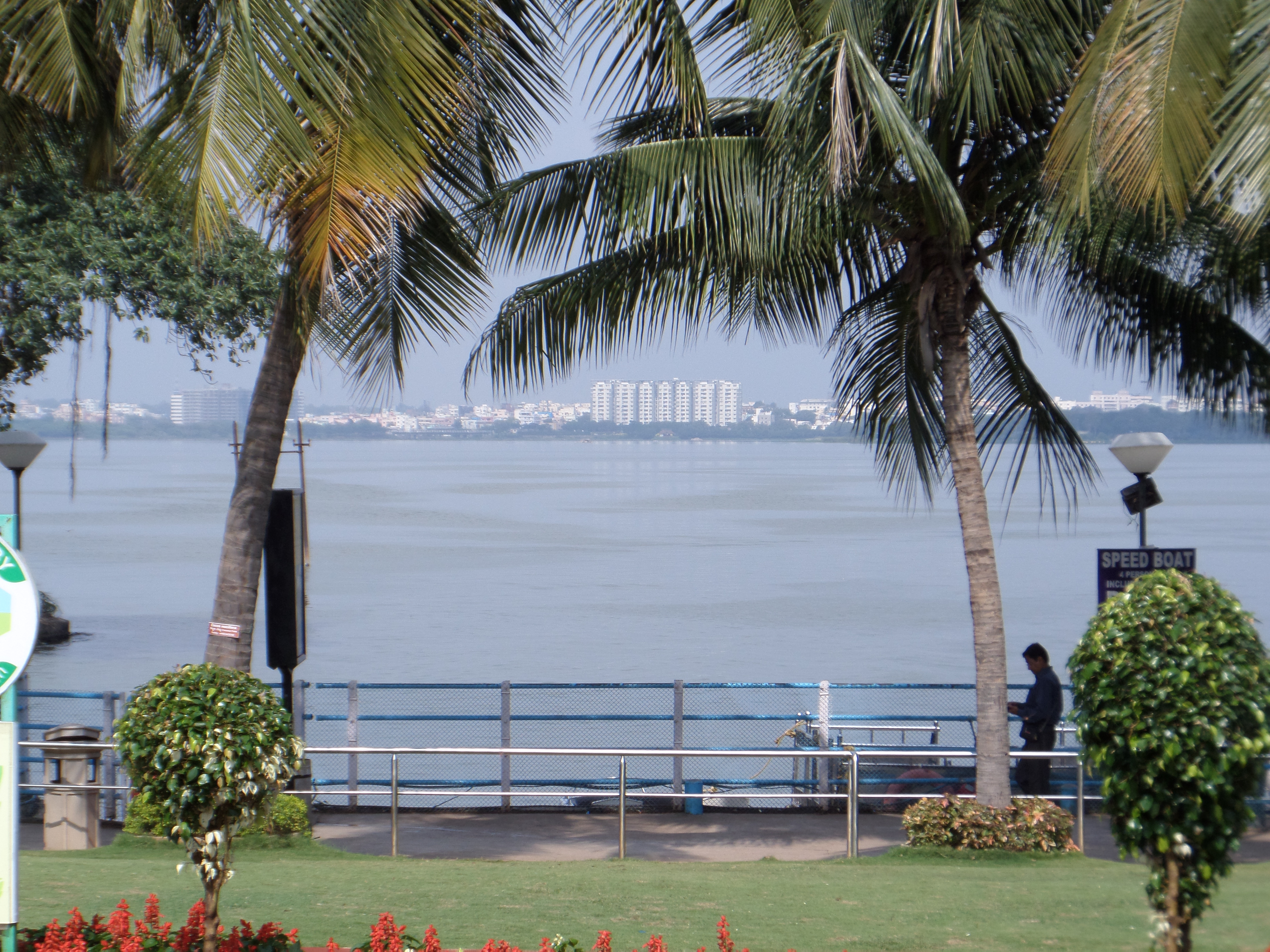 blue water,hussian sagar lake,hyderabad,A.P